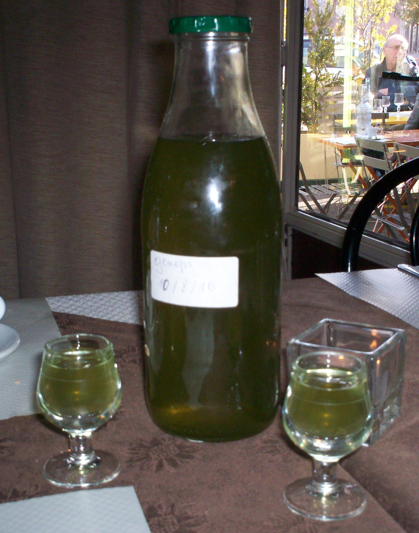 Génépi fermier, produit près de Briançon